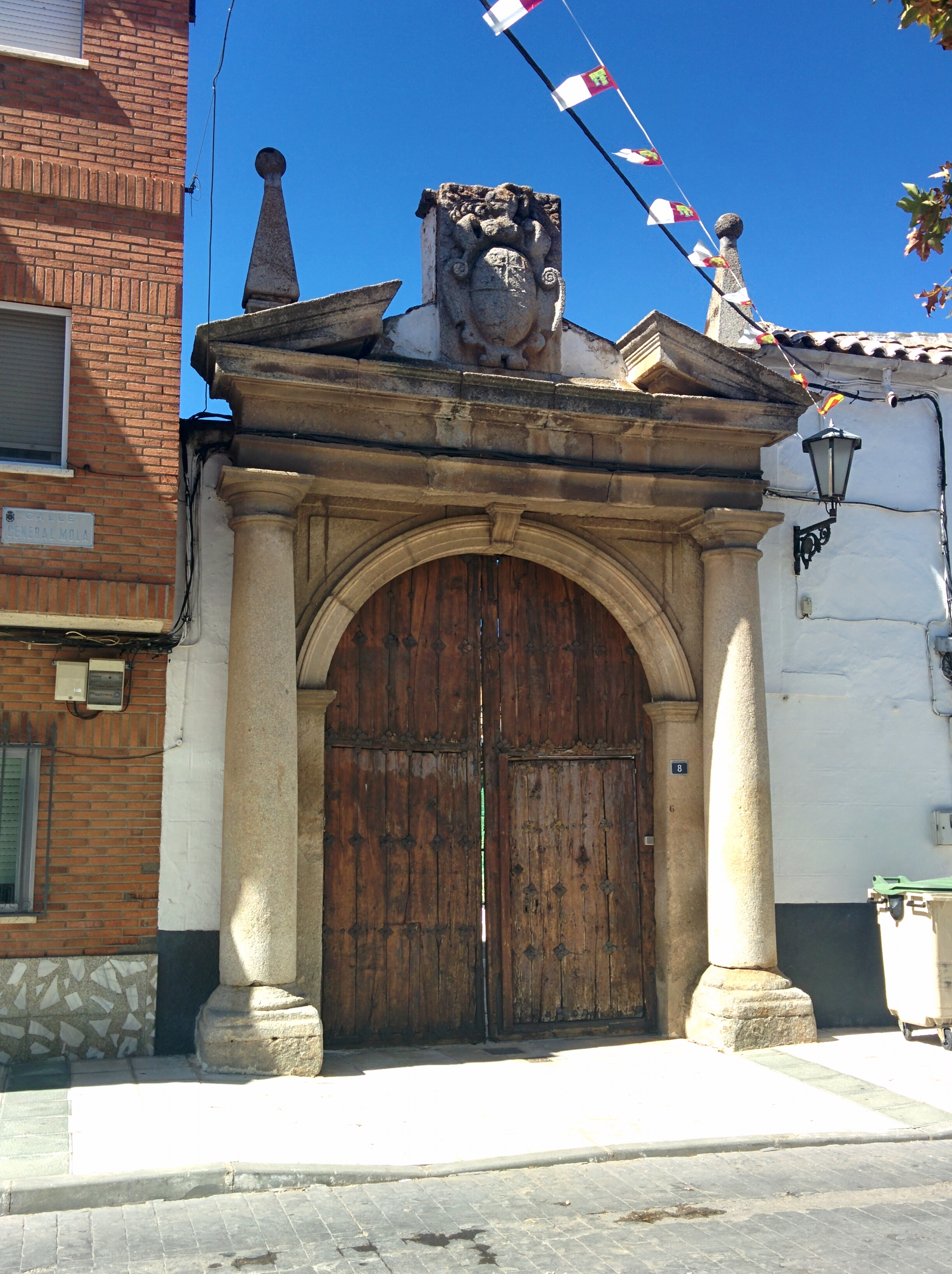 Portada de la Casa de las Columnas, en Polán (Toledo, España).